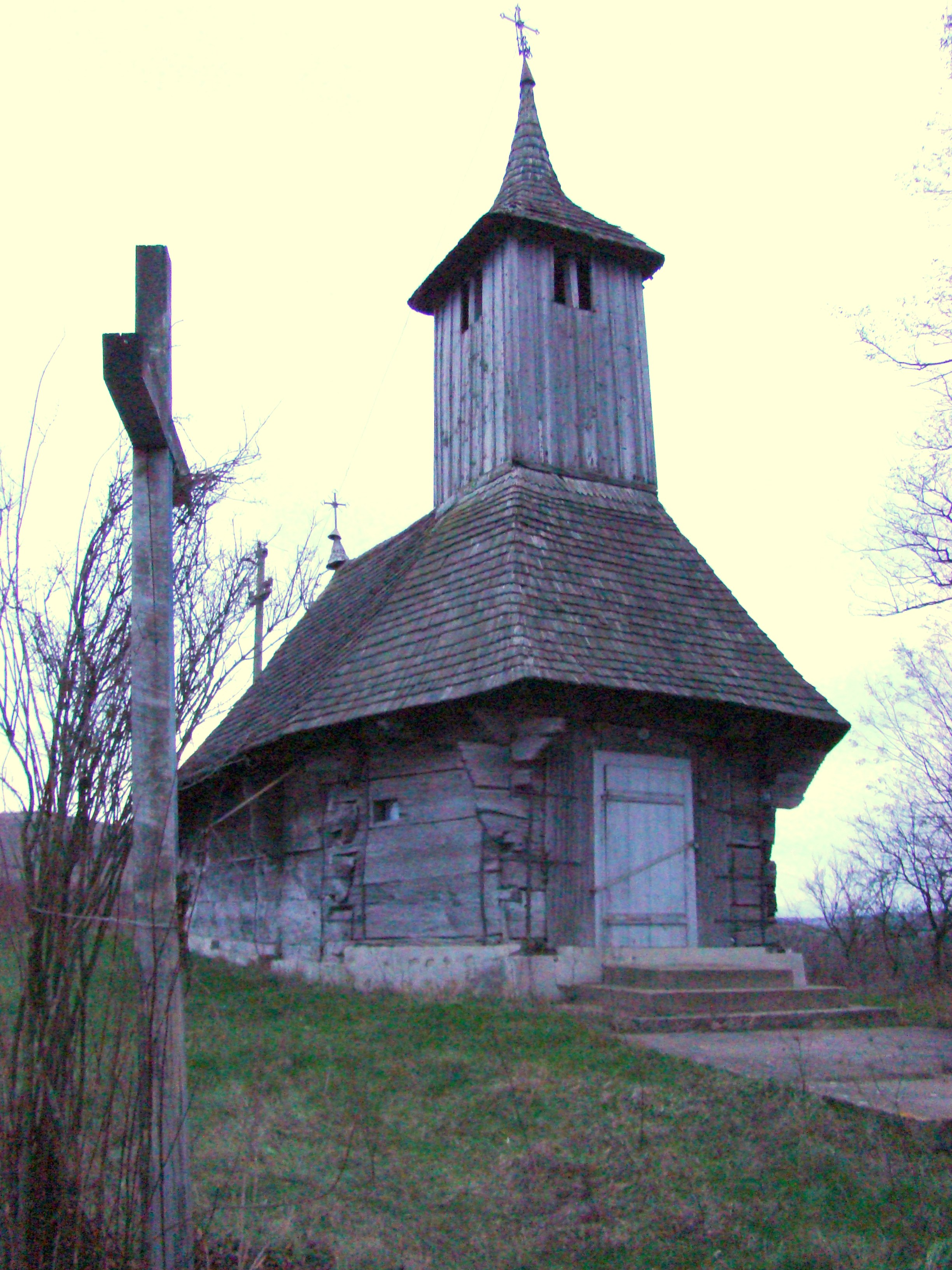 Copăceni, Bihor